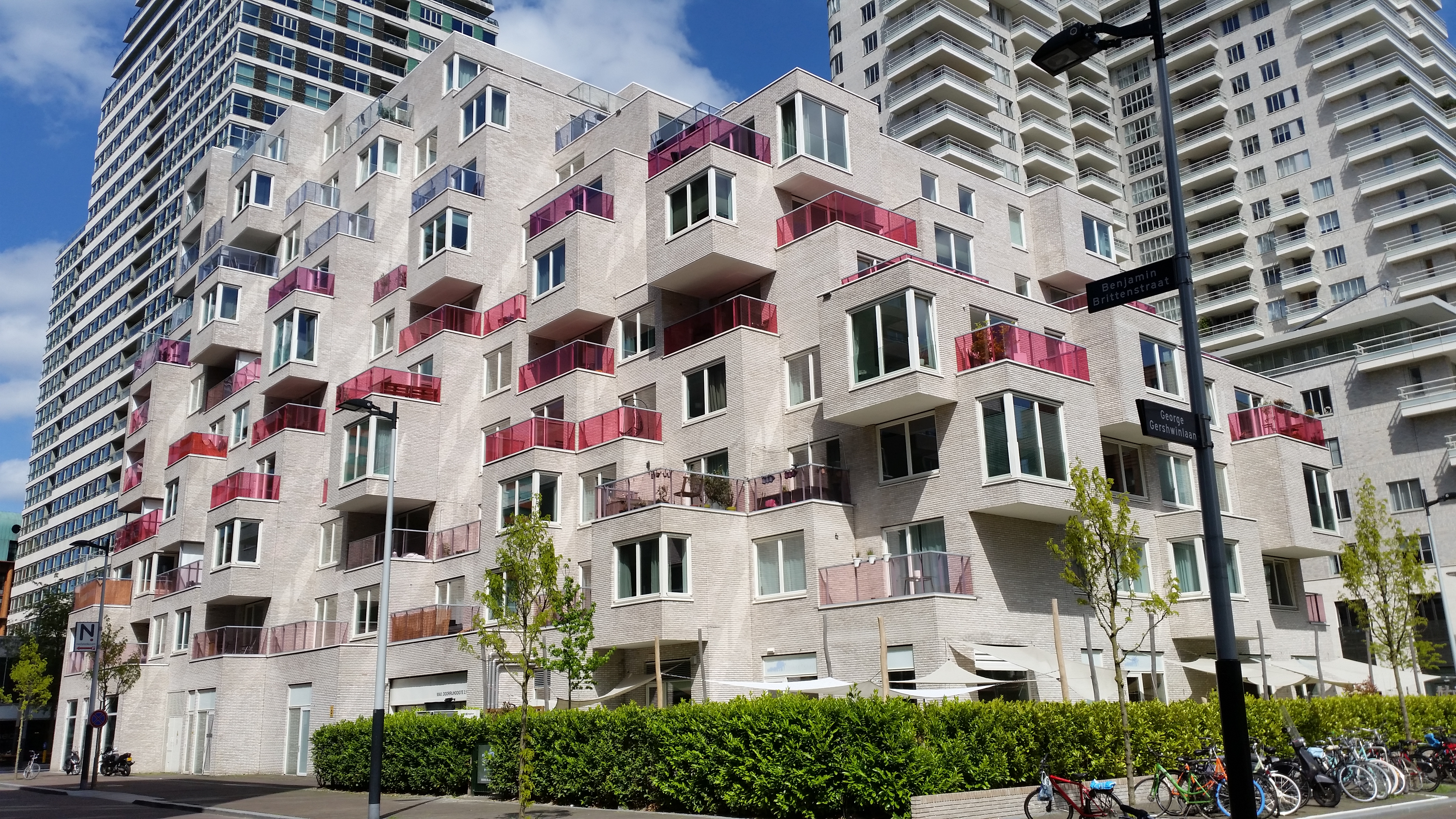 Stapelwoningen aan de Benjamin Brittenstraat, Amsterdam